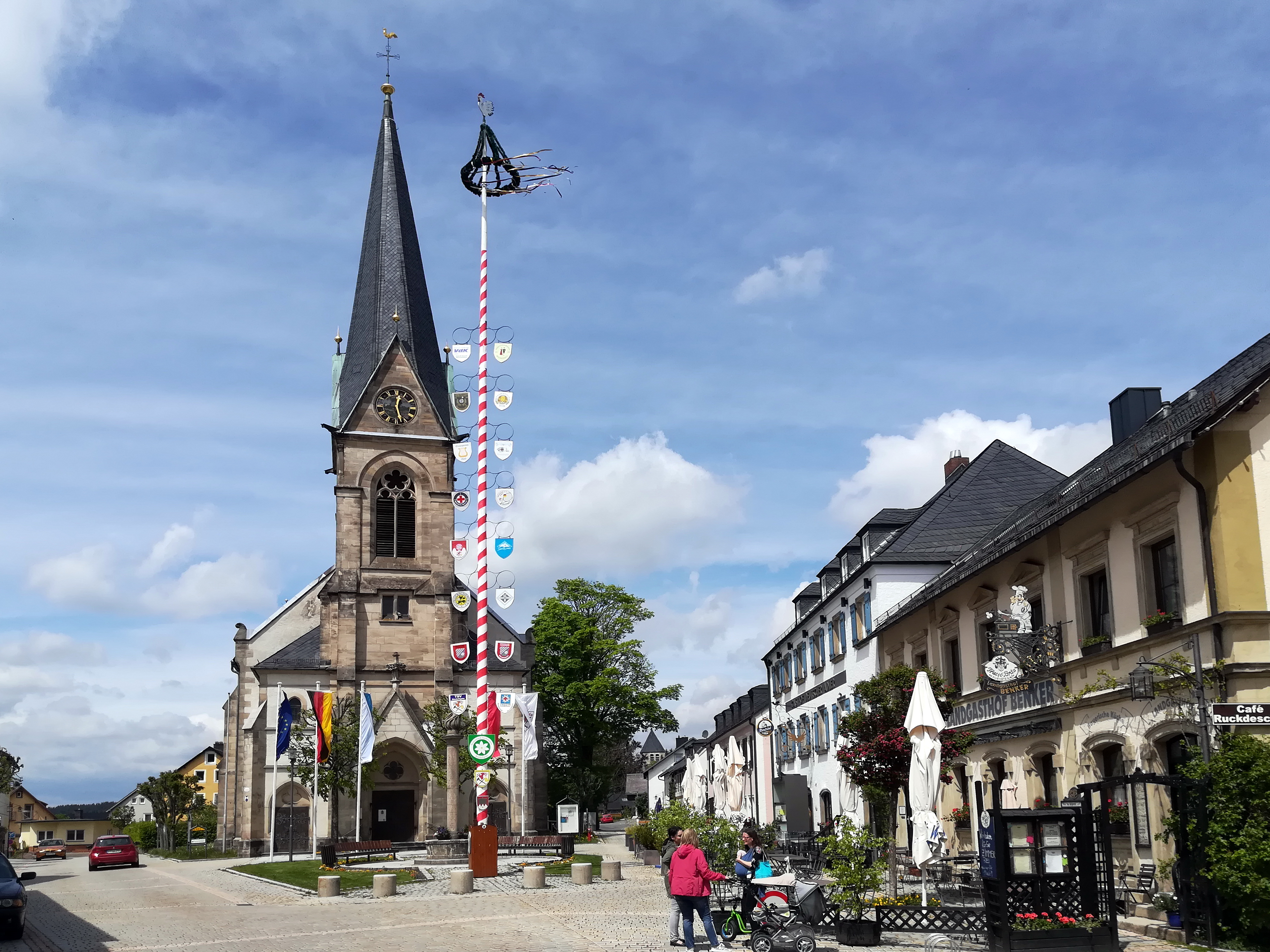 Neugotische Hallenkirche mit eingezogenem Chor, der Turm mit Spitzhelm, 1889–91 nach Plänen von Bruno Specht.